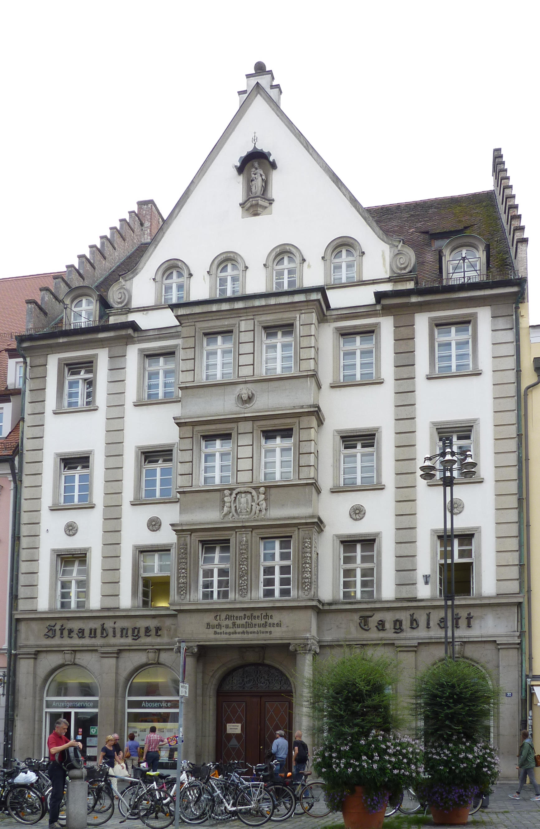 Ein viergeschossiges Gebäude am Ludwigsplatz 32 und 34, das das Geschäftshaus des Straubinger Tagblatts beinhaltet. Die Renaissance-Formen stammen aus dem Jahr 1928 von Heilmann &Littmann.This is a photograph of an architectural monument.